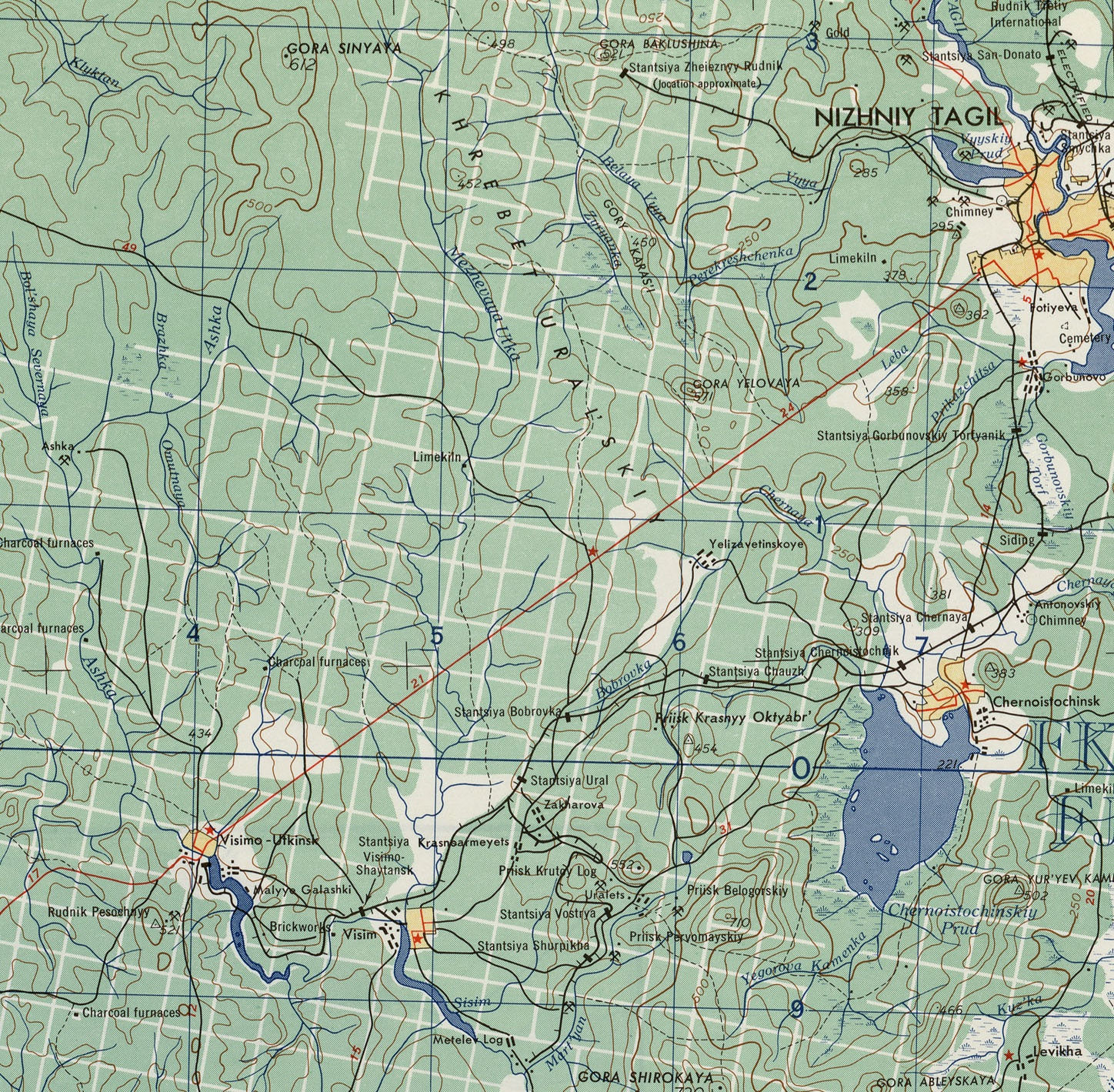 Часть листа из набора карт Восточной Европы Картографической военной службы США. Серия 501. 1954 Висимо-Уткинская узкоколейная железная дорога. Масштаб 1:250 000